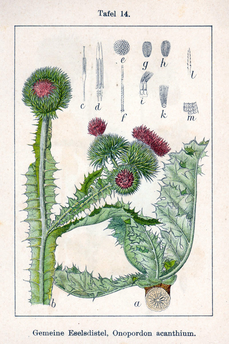 Onopordum acanthium L. Original Description Gemeine Eselsdistel, Onopordon acanthium